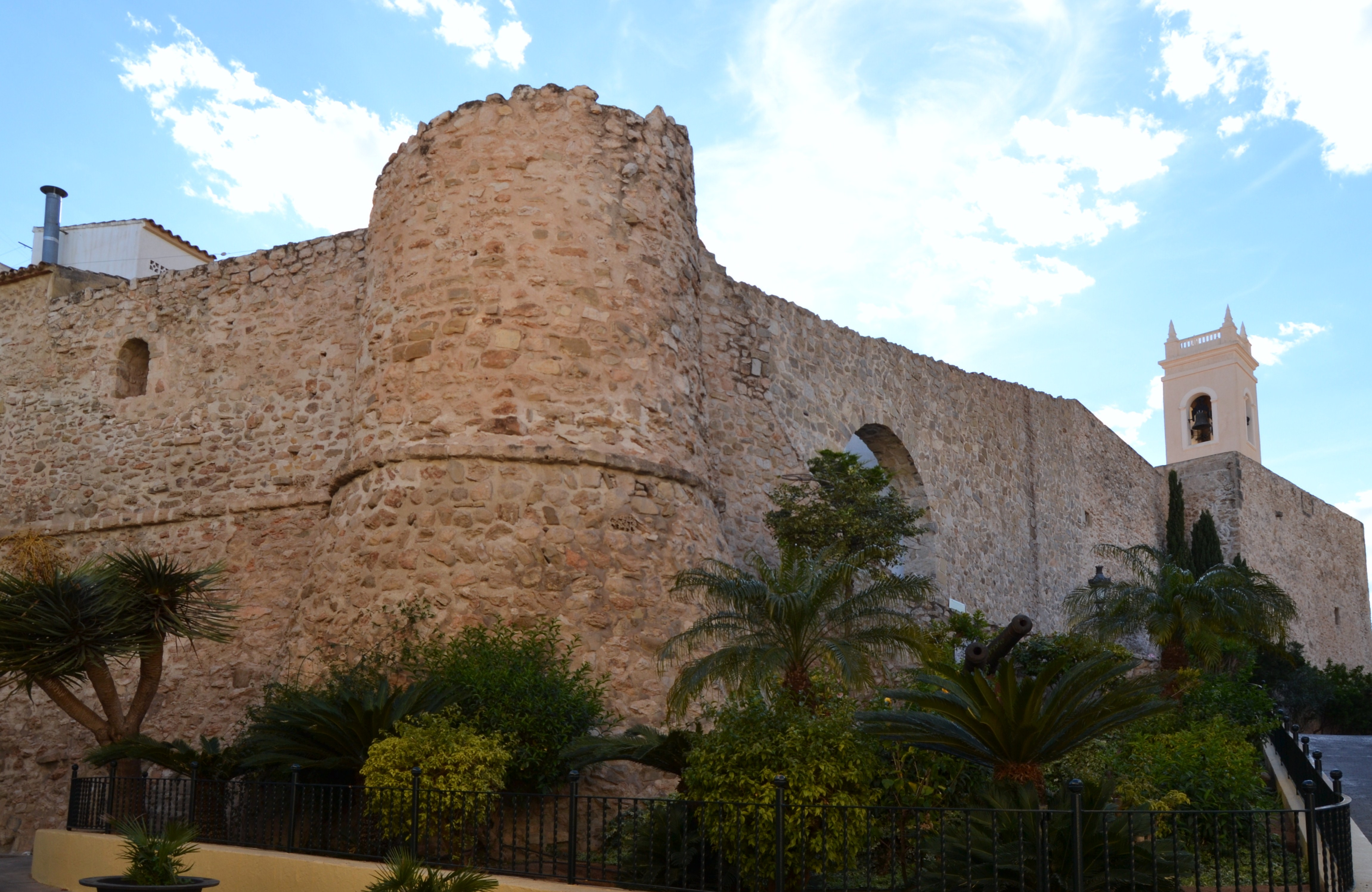 Torreó de la peça i muralla, Calp.